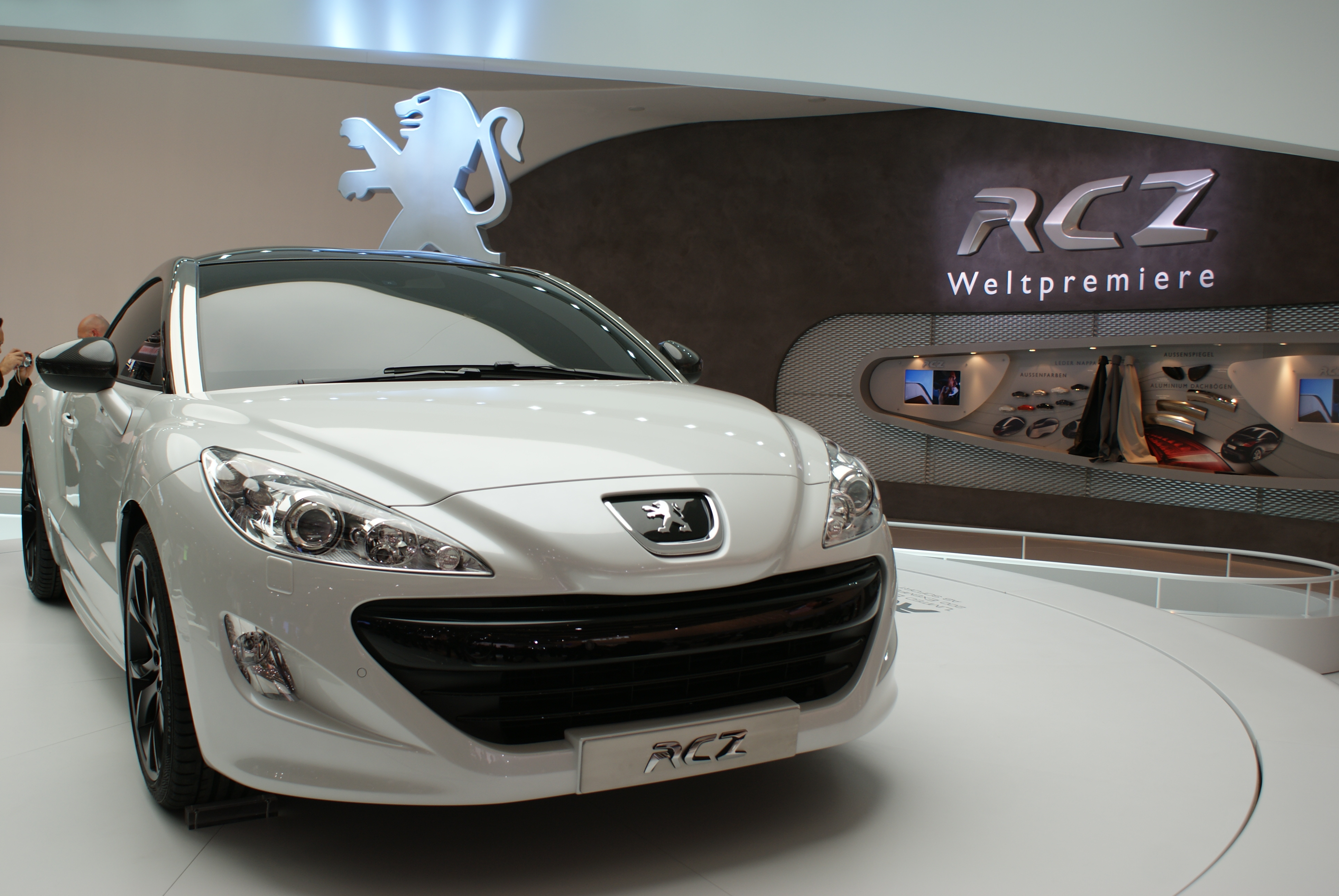 Peugeot RCZ Limited Edition au Salon de Francfort 2009